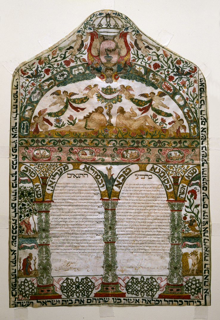 Taken from The Ketubot Collection of the National Library of Israel Ketubbah (Marriage contract) Livorno, Italy, 1746 Pen and ink and tempera on parchment H 824 L 562 The Stieglitz Collection, donated with the contribution of Erica and Ludwig Jesselson, ew York, through American friends of the Israel Museum 179/345 Collection The Israel Museum, Jerusalem ליוורנו, איטליה, תק"ו (1746)החתן: שמריה בן מרדכי לוי סונסיןהכלה: דונה חוה בת מנחם חי לוי סונסין קלף, צבעי טמפרה, כתב-יד בדיוג: 82.4, ר: 54.2 ס"מאוסף שטיגליץ, ניתן למוזיאון ישראל, ירושלים, בעזרת תרומה מאת אריקה ולודוויג יסלזון, ניו-יורק, באמצעות ידידי מוזיאון ישראל בארה”בB86.0152, 179/345